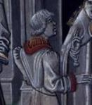 Foulques V comte d'Ajou et roi de Jérusalem lors de son mariage avec Mélisende